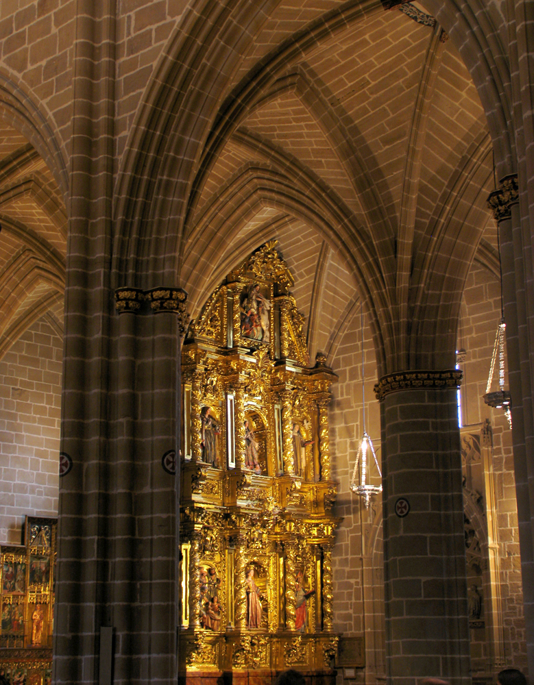 Retablo de Santa Catalina y su capilla, catedral de Pamplona